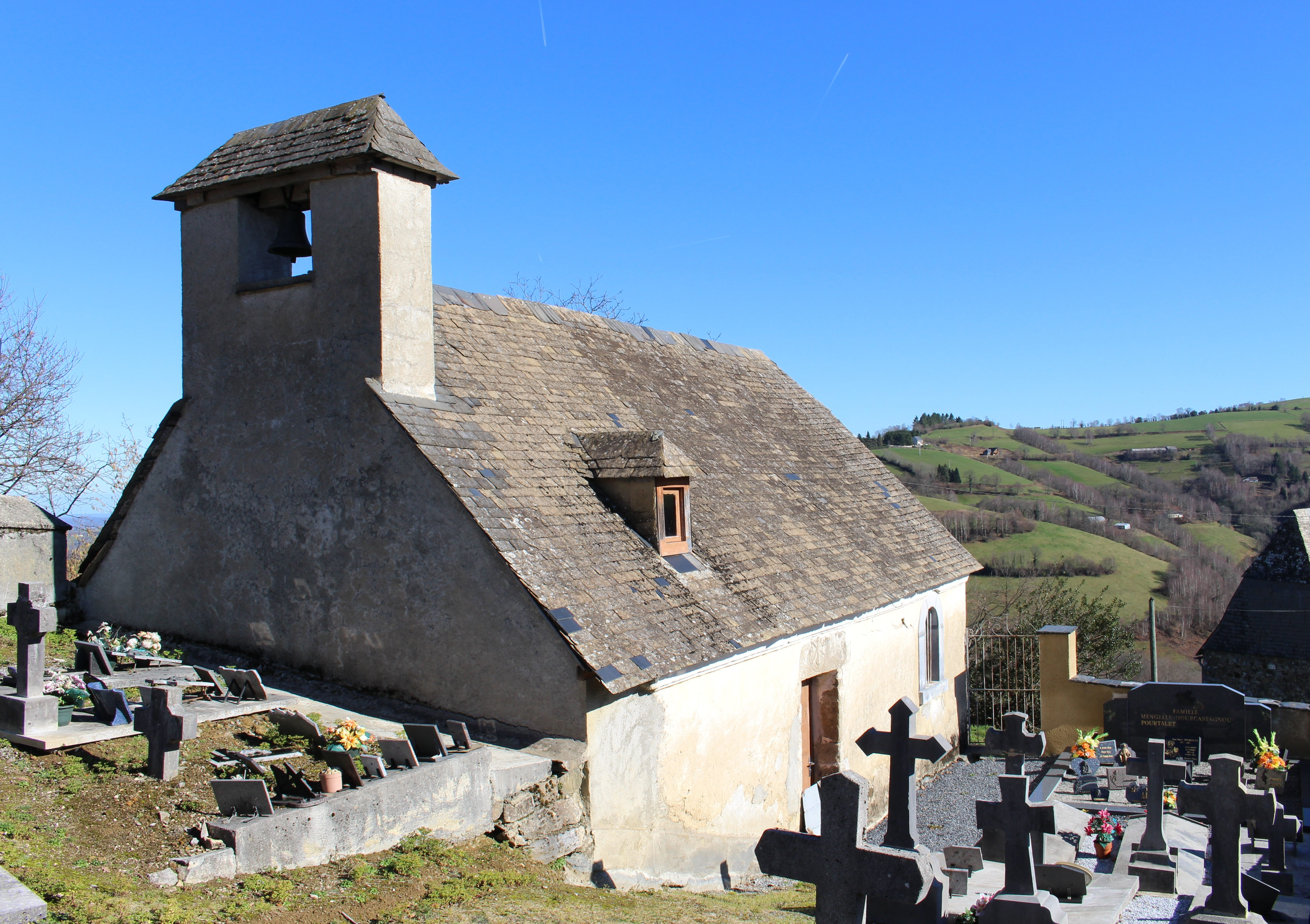 Église Notre-Dame-de-l'Assomption de Lanso (Hautes-Pyrénées)